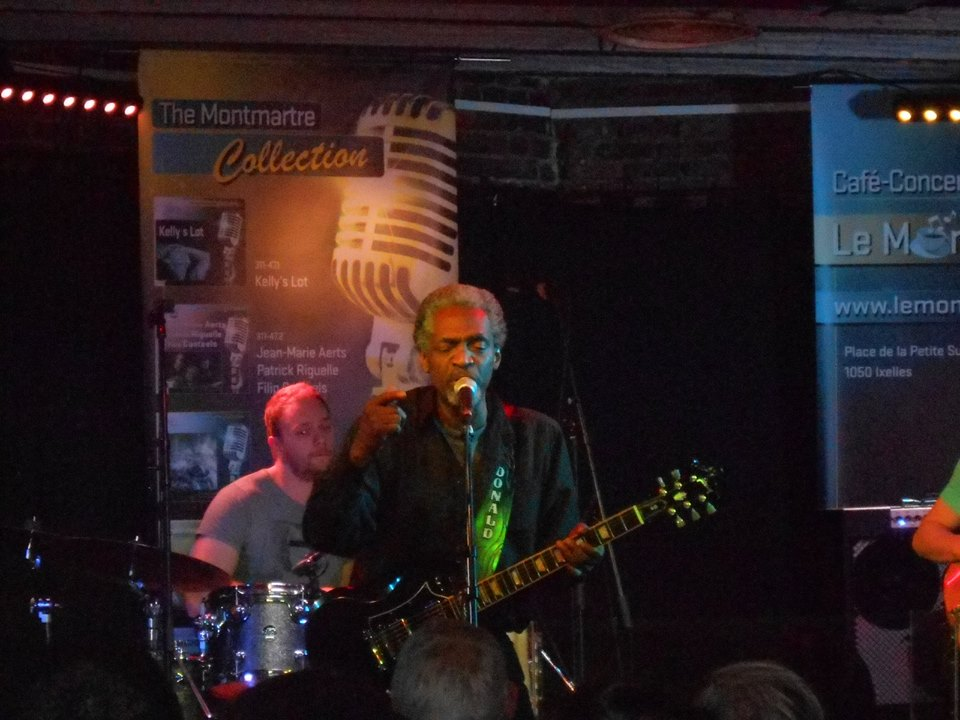 Donald Kinsey lors d'un concert au Montmatre à Bruxelles en 2014.